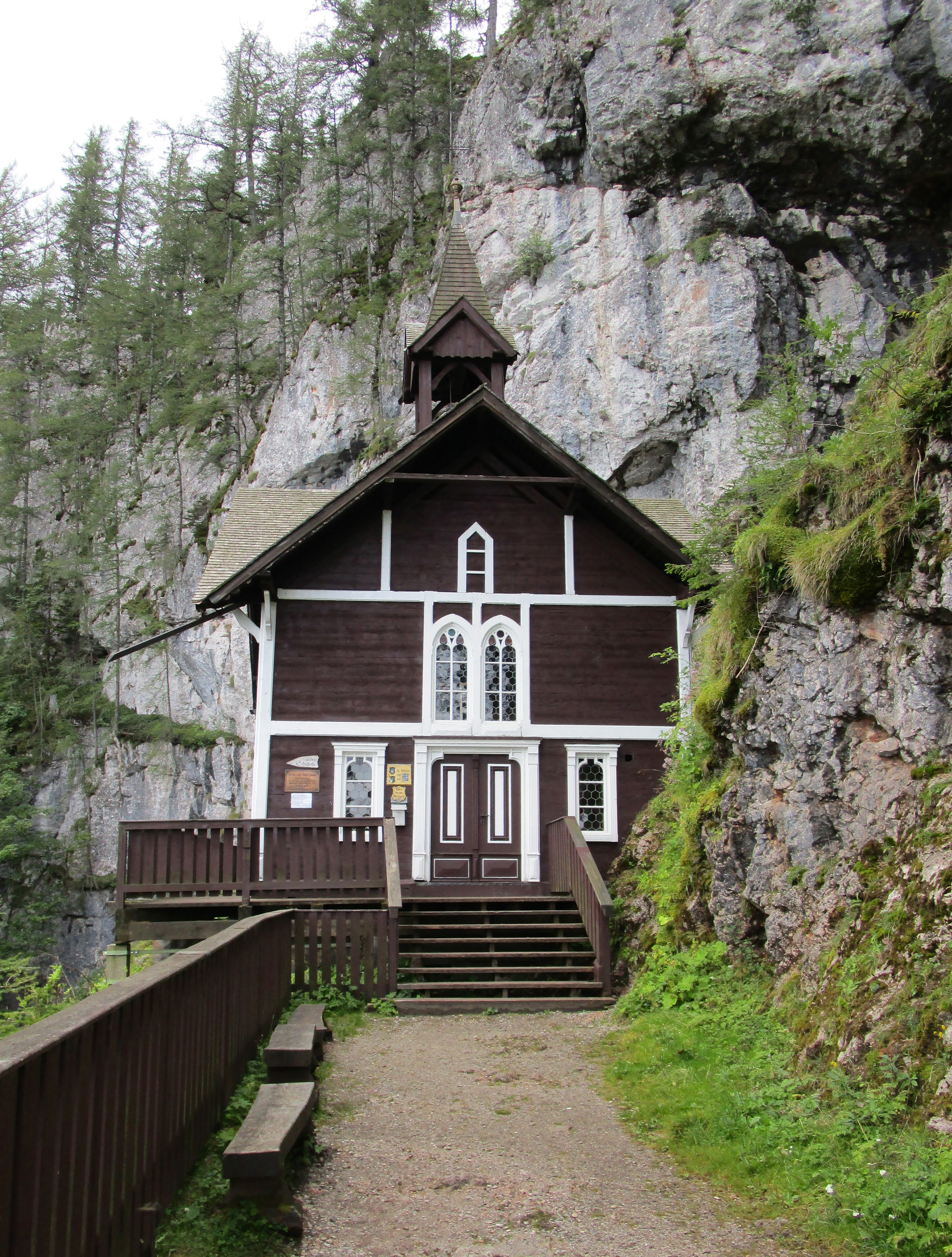 Schüsserlbrunnkapelle am Hochlantsch